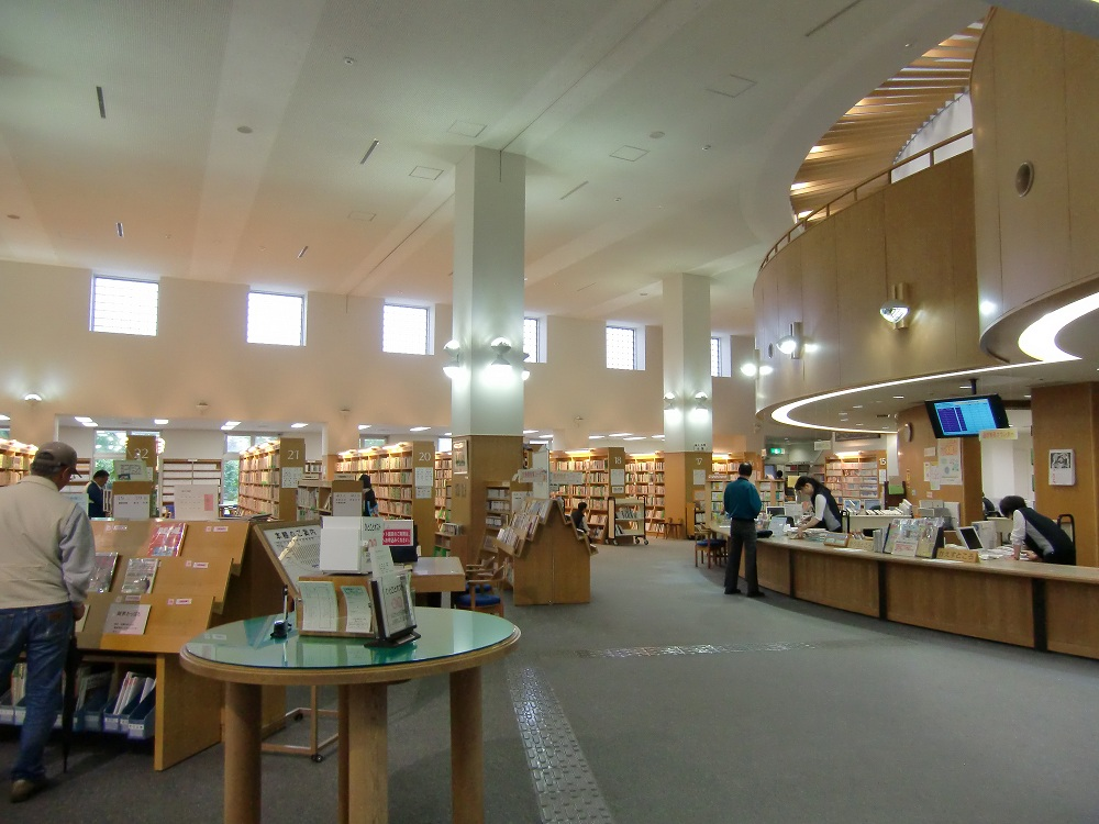 恵庭市立図書館館内カウンター （2013年6月18日撮影）